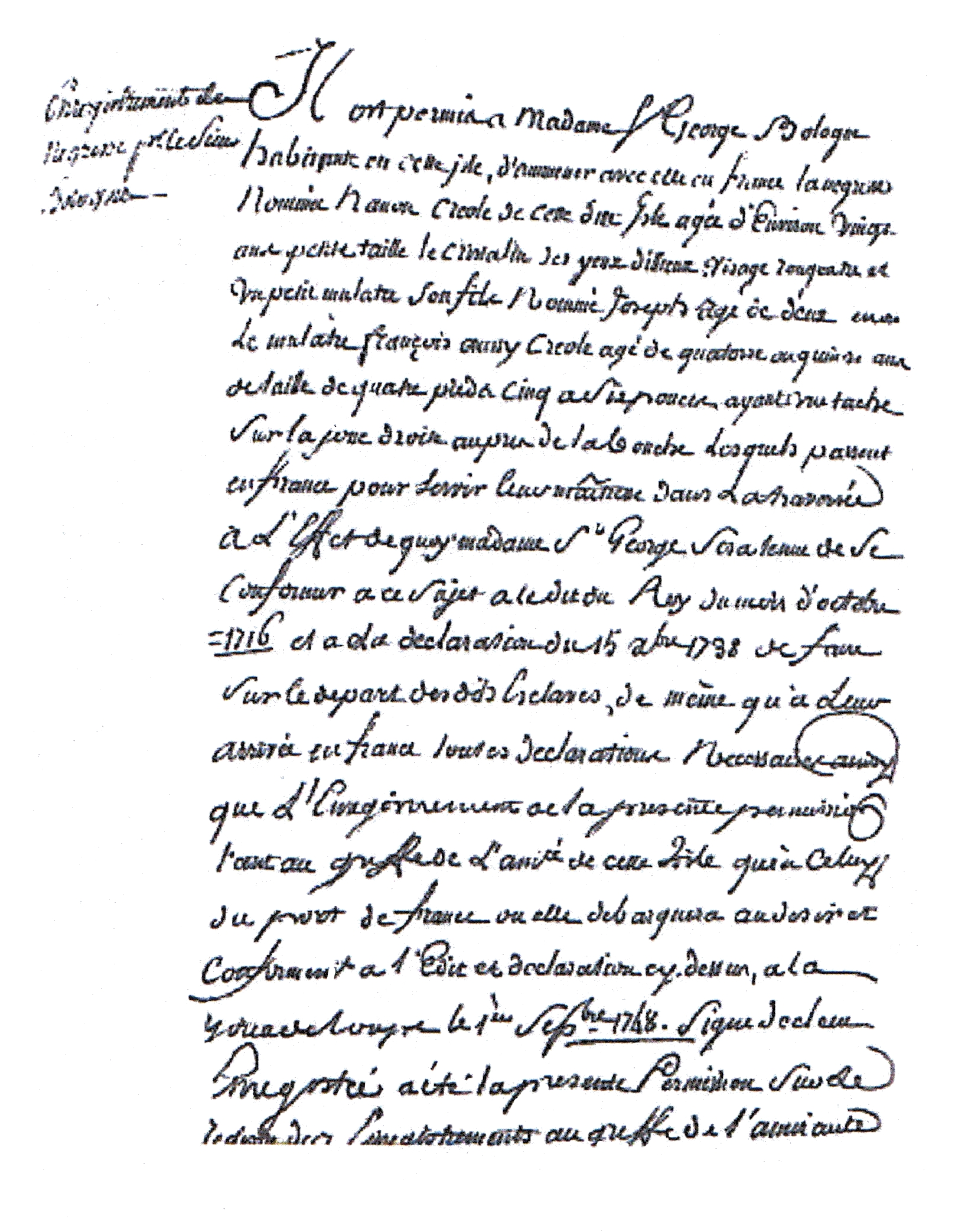 Permission donnée par l'amirauté de la Guadeloupe à Madame Saint-George Bologne d'ammener en France, Nanon, negresse, agé d’environ 20 ans et son fils, Joseph, agé 2 ans, datée 1er Septembre 1748.